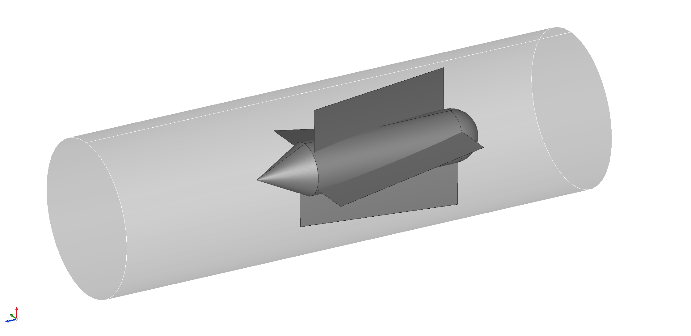 Schéma d'un swirler à 4 pâles à l'intérieur d'une conduite circulaire.